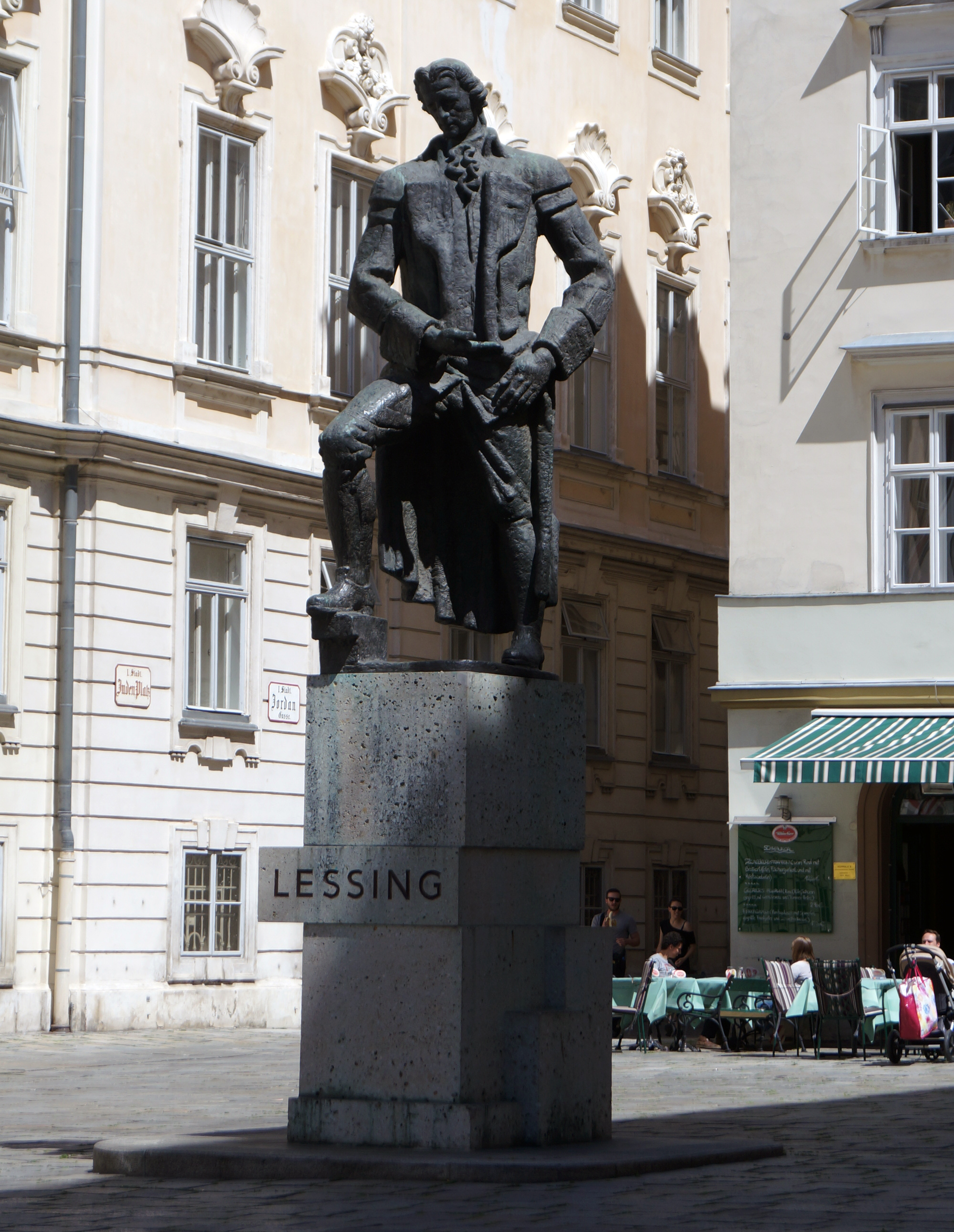 Lessingdenkmal am Wiener Judenplatz